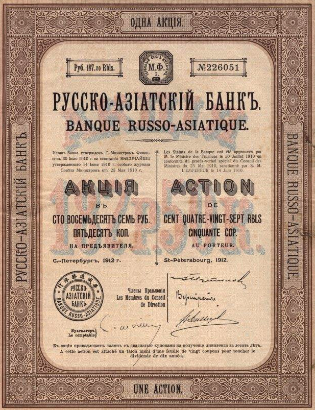 Акция в 187,5 руб. на предъявителя Русско-Азиатского банка. С.-Петербург, 1912 г.